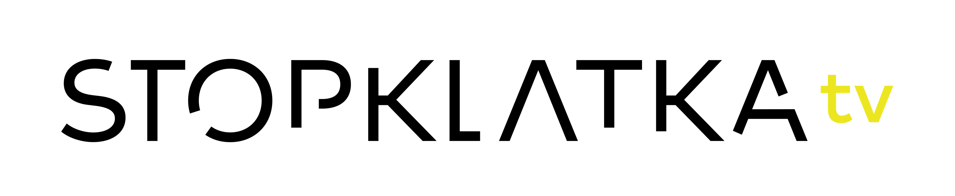 gggrdfhjfjdfj